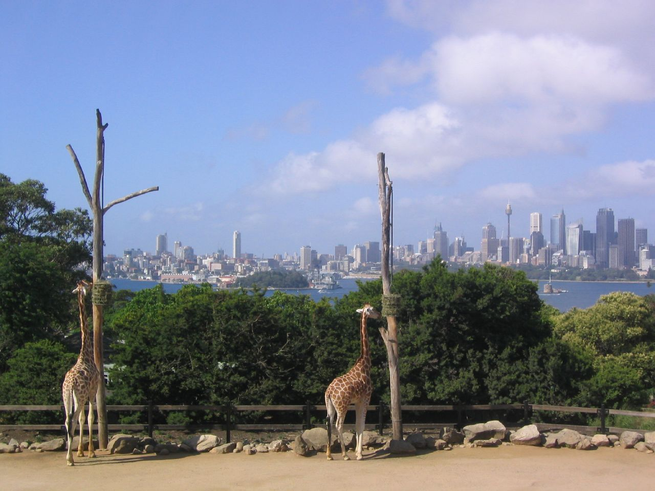 Sydney et Taroonga Zoo